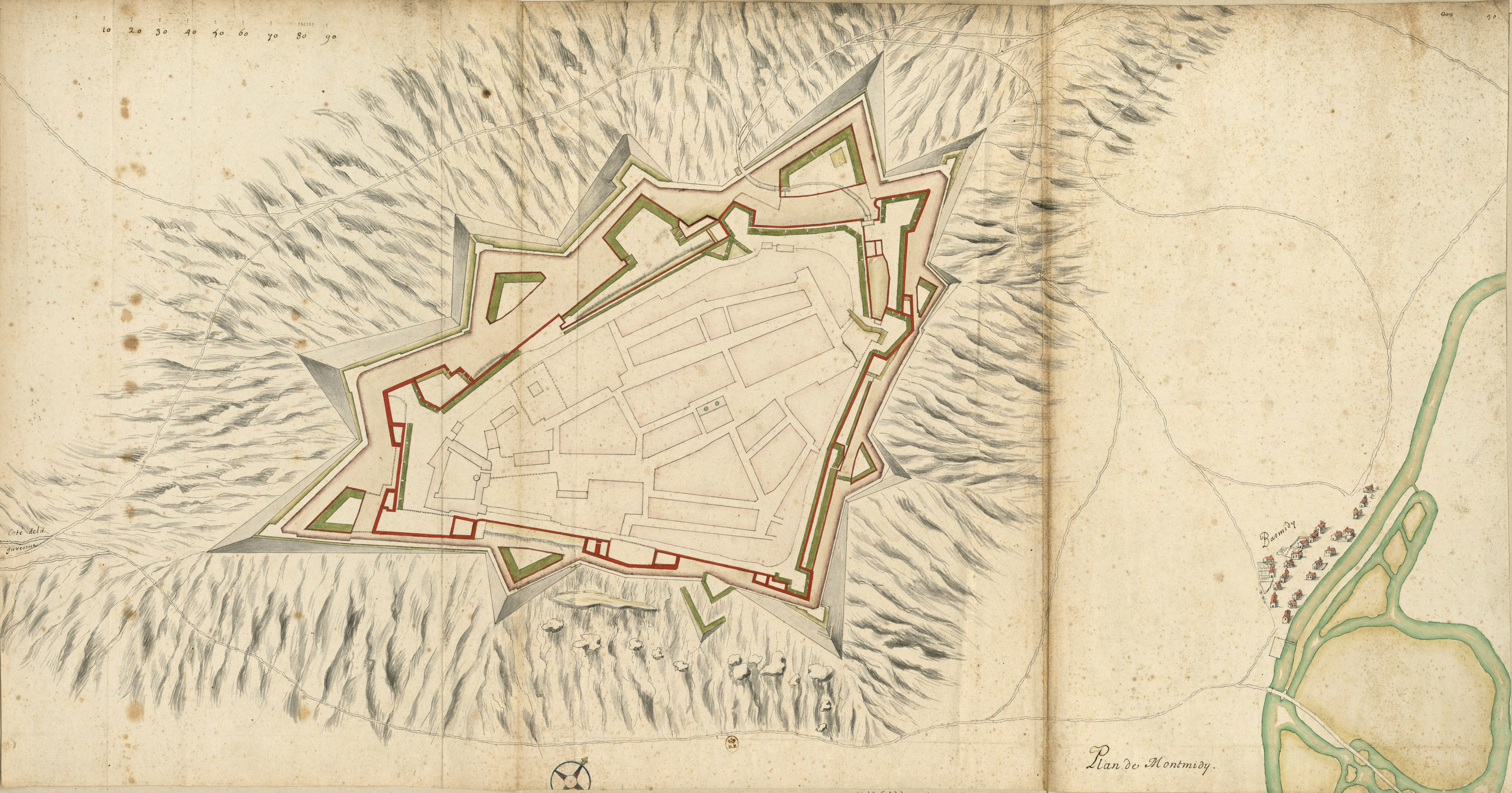 Plan de Montmidy [Montmédy, Meuse] : dessin